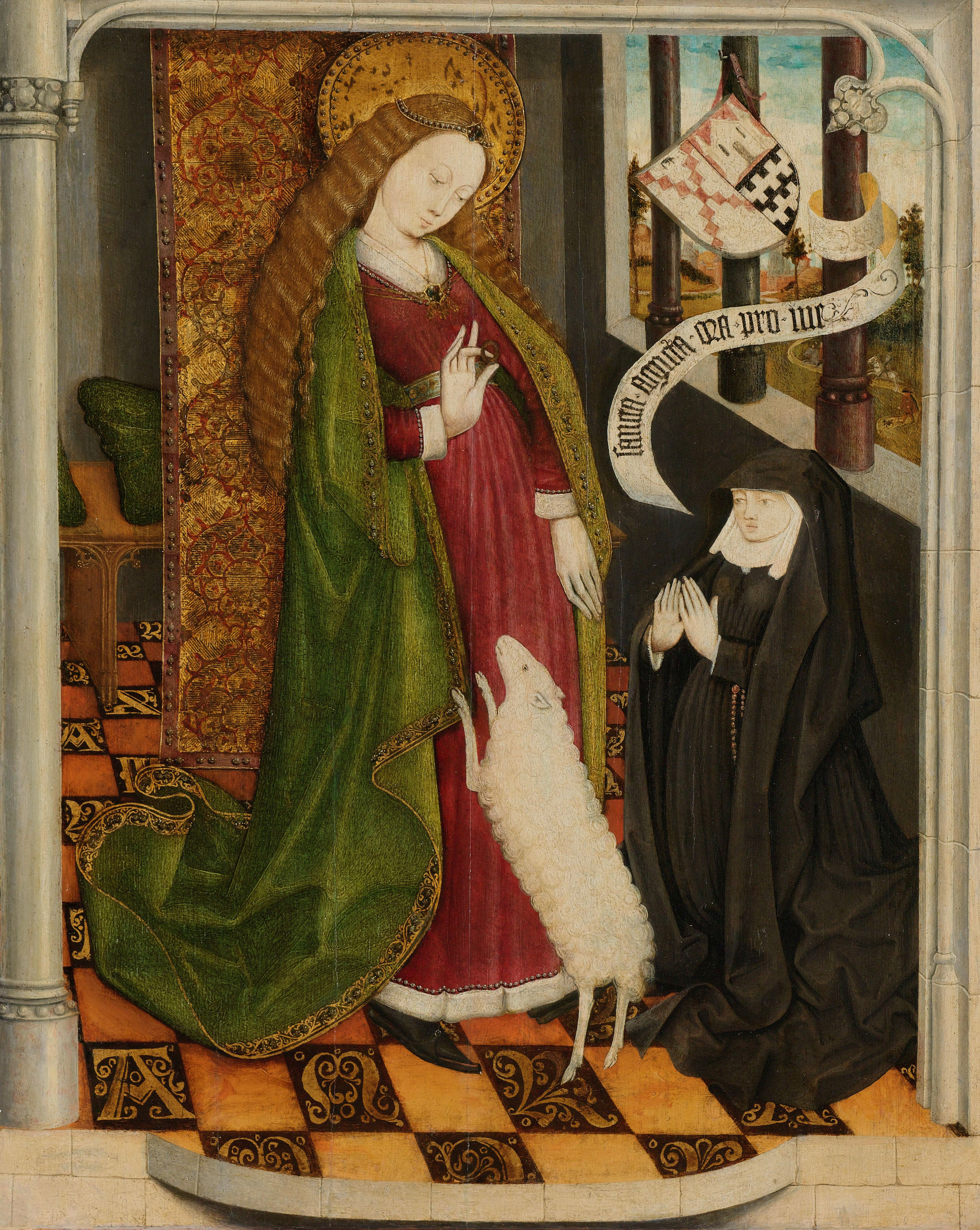 De stichteres Geertruy Haeck-van Slingelandt van der Tempel (ca. 1425-1467) knielend in aanbidding voor de heilige Agnes met een lam. Rechtsboven voor het venster een banderol met tekst en het familiewapen.; Noordelijke Nederlanden (Dordrecht?), ca. 1465, olieverf op paneel